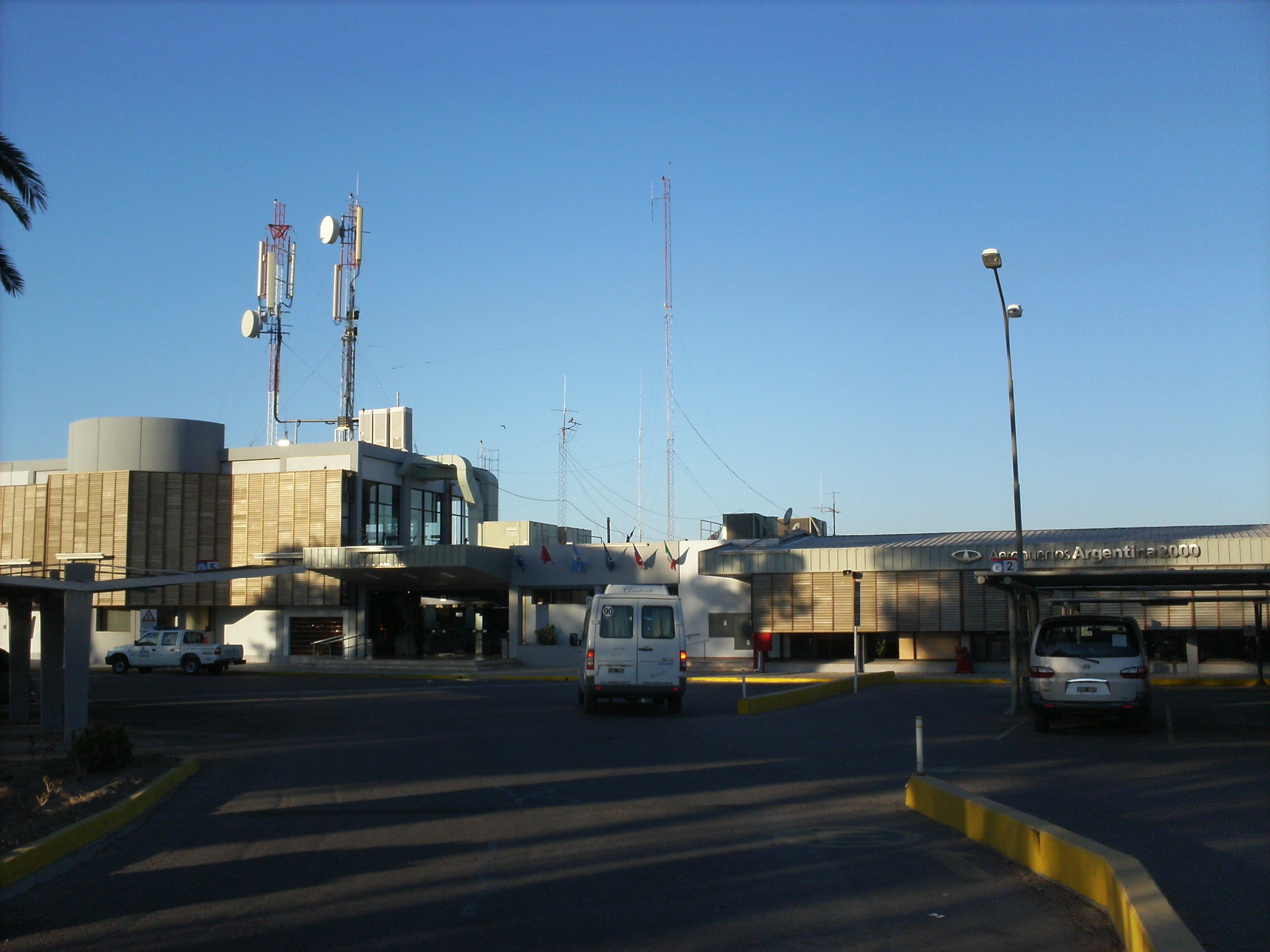 vista parcial de la torre de control y del edificio principal